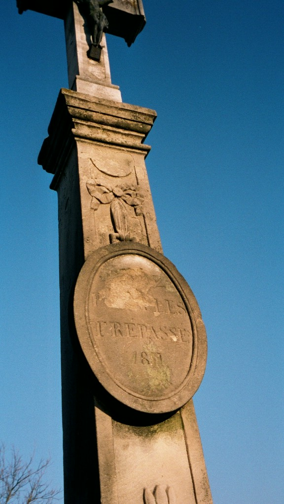 détail de la croix du cimetière rive gauche en grès jaune